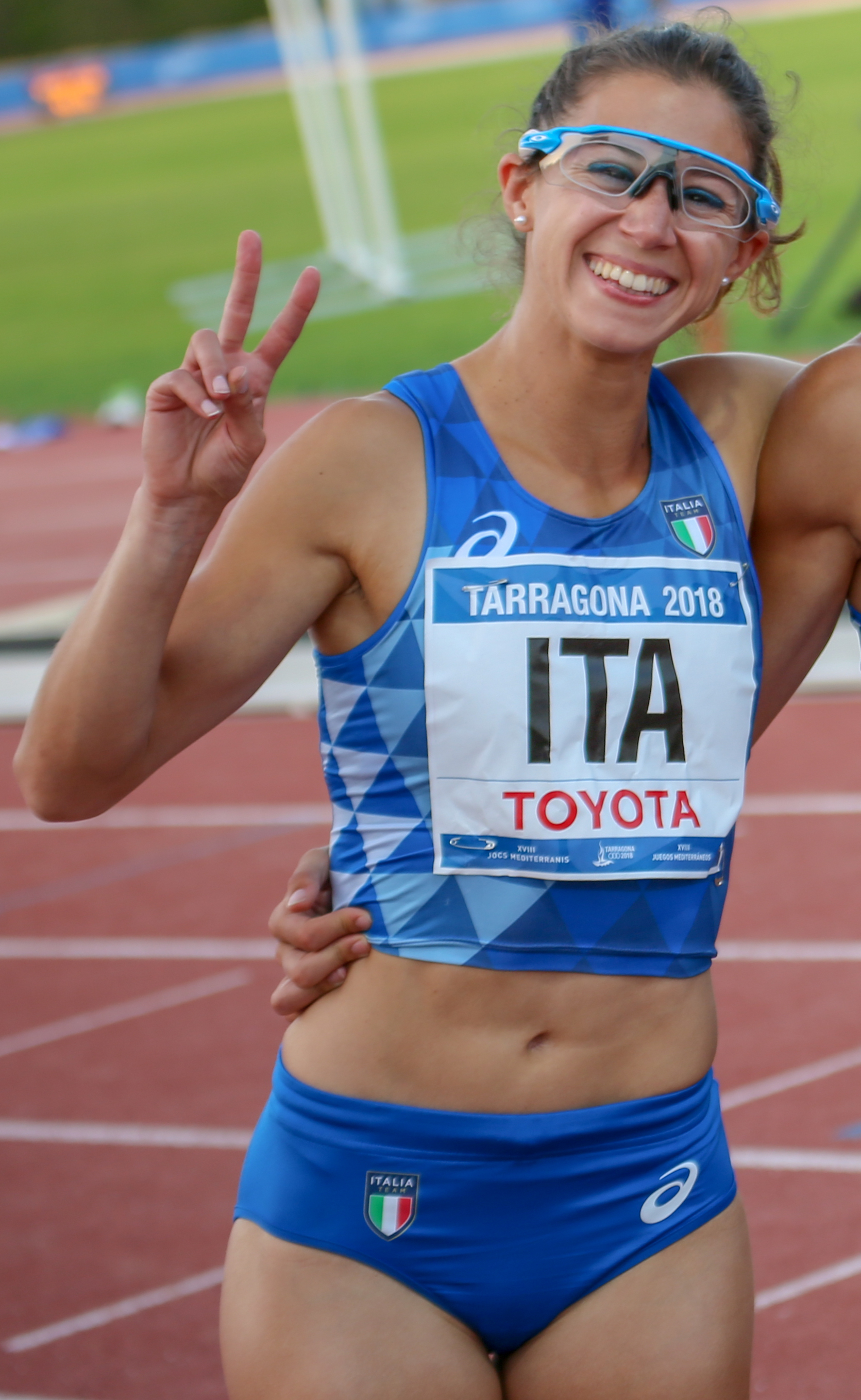 Irene Siragusa en los relevos 4x100 en los Juegos del Mediterráneo 2018